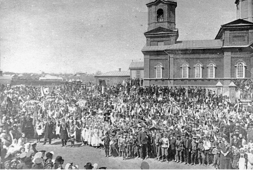 Покровский собор в городе Шахты Ростовской области РФ